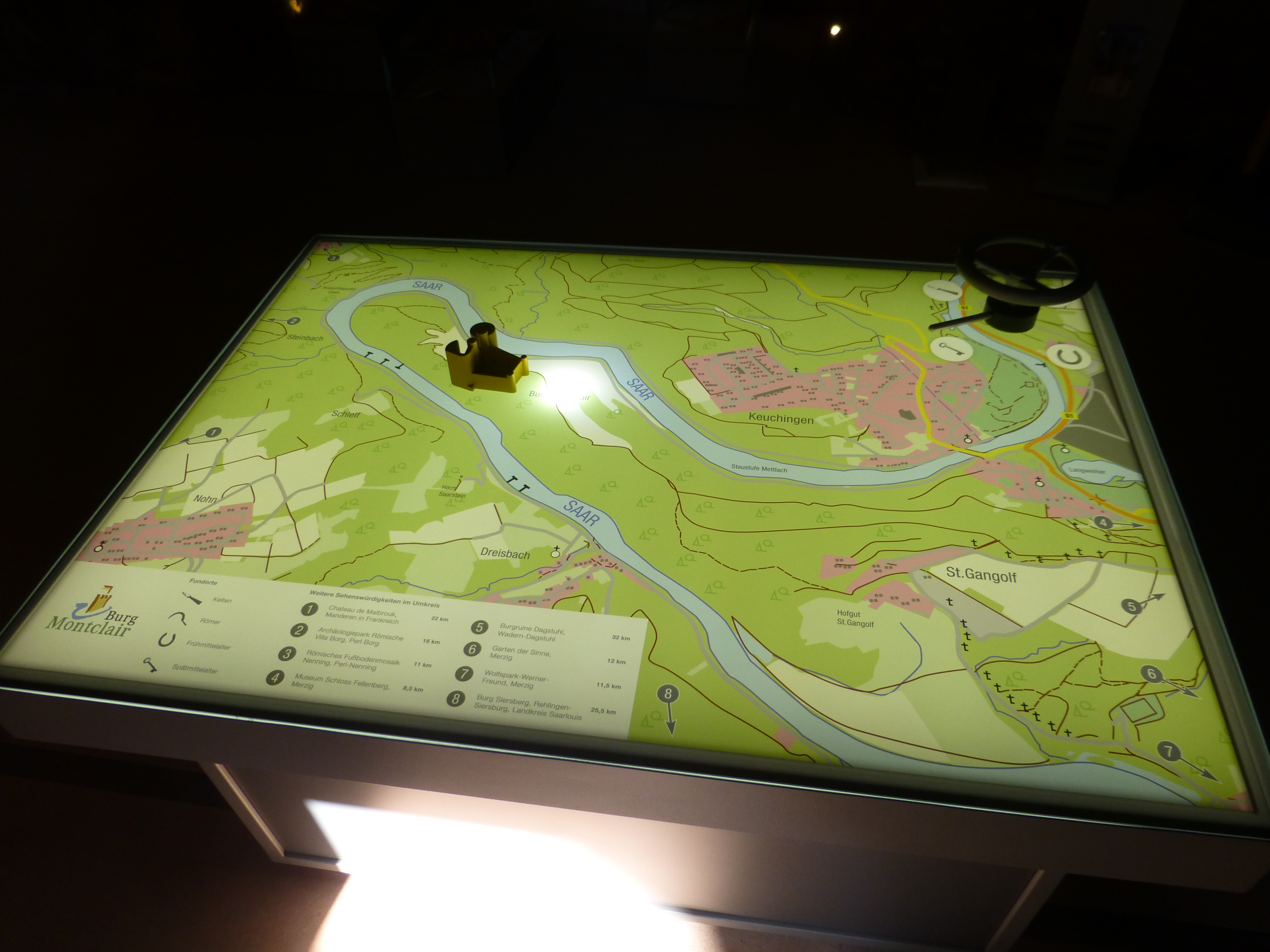 Burg Montclair; im Museum der Burgruine